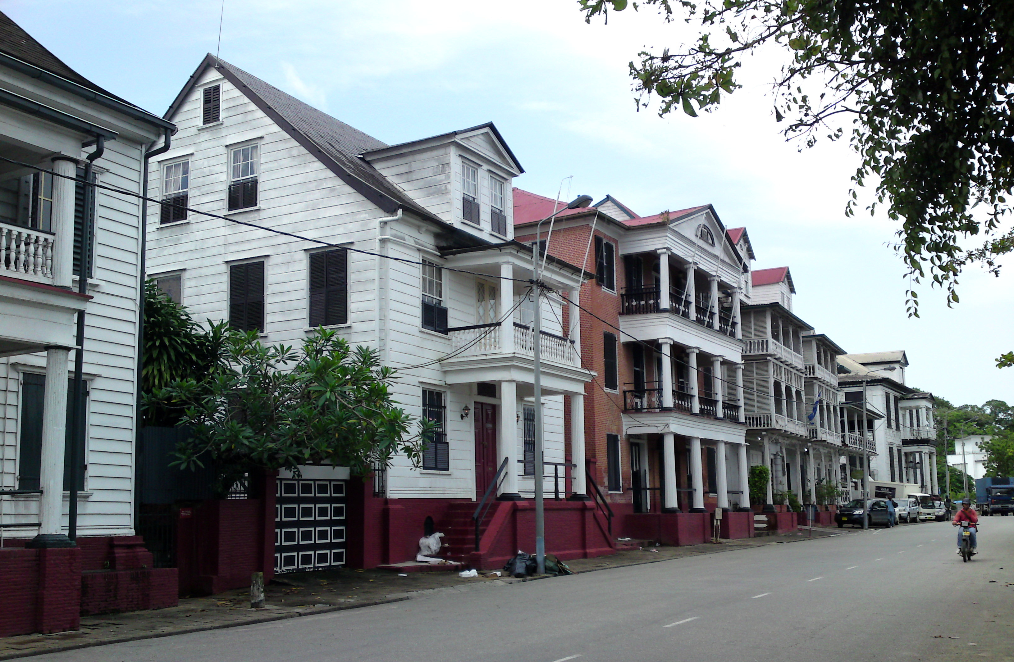 Waterkant